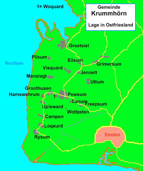 Lage der Gemeinde Krummhörn in Ostfriesland